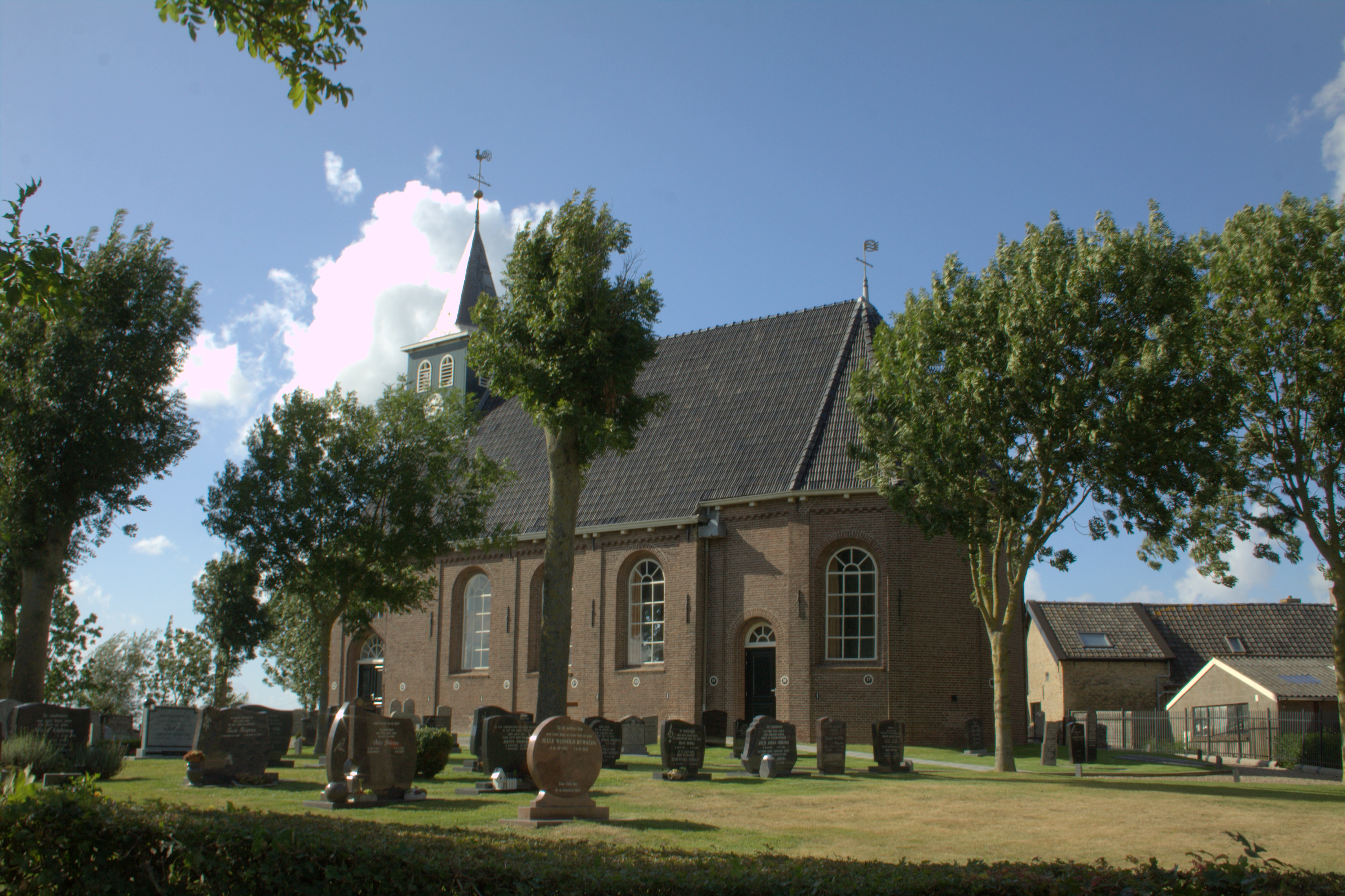 De Hervormde kerk op een terp in de Friese plaats Wjelsryp.